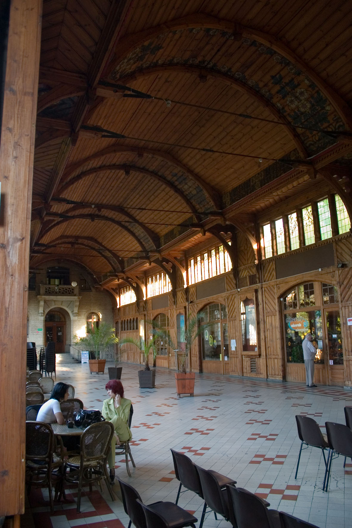 Świeradów Zdrój, Poland Author: Adam Kumiszcza